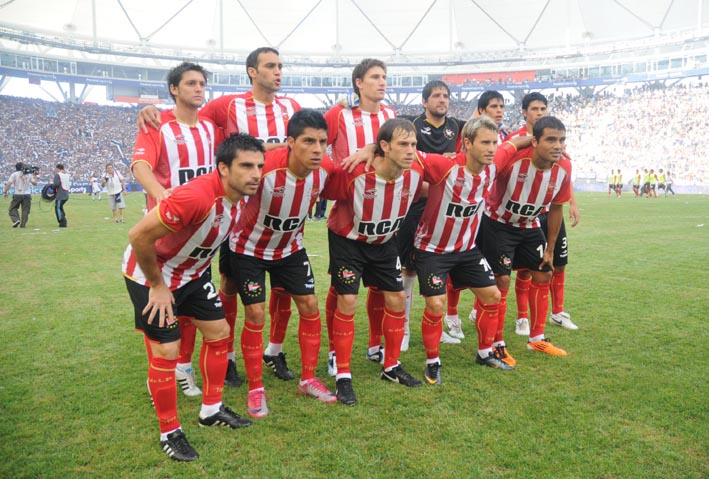 El equipo de Estudiantes de La Plata que derrotó a Gimnasia, como visitante, 2-0, en el clásico platense del 5 de marzo de 2011, que se disputó solamente con la presencia del público local. Arriba: Matías Sánchez, Leandro Desábato, Federico Fernández, Agustín Orión, Pablo Barrientos y Facundo Roncaglia; abajo: Rodrigo Braña, Enzo Pérez, Raúl Iberbia, Gastón Fernández y Gabriel Mercado.